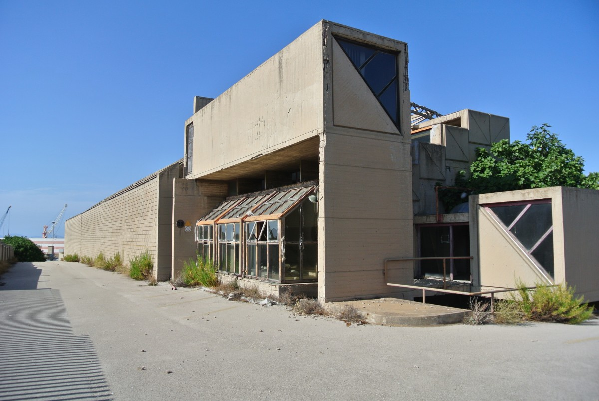 Compagnia Industriale MEditerranea Legnami (C.I.ME.L.) designed by Aldo Luigi Rizzo